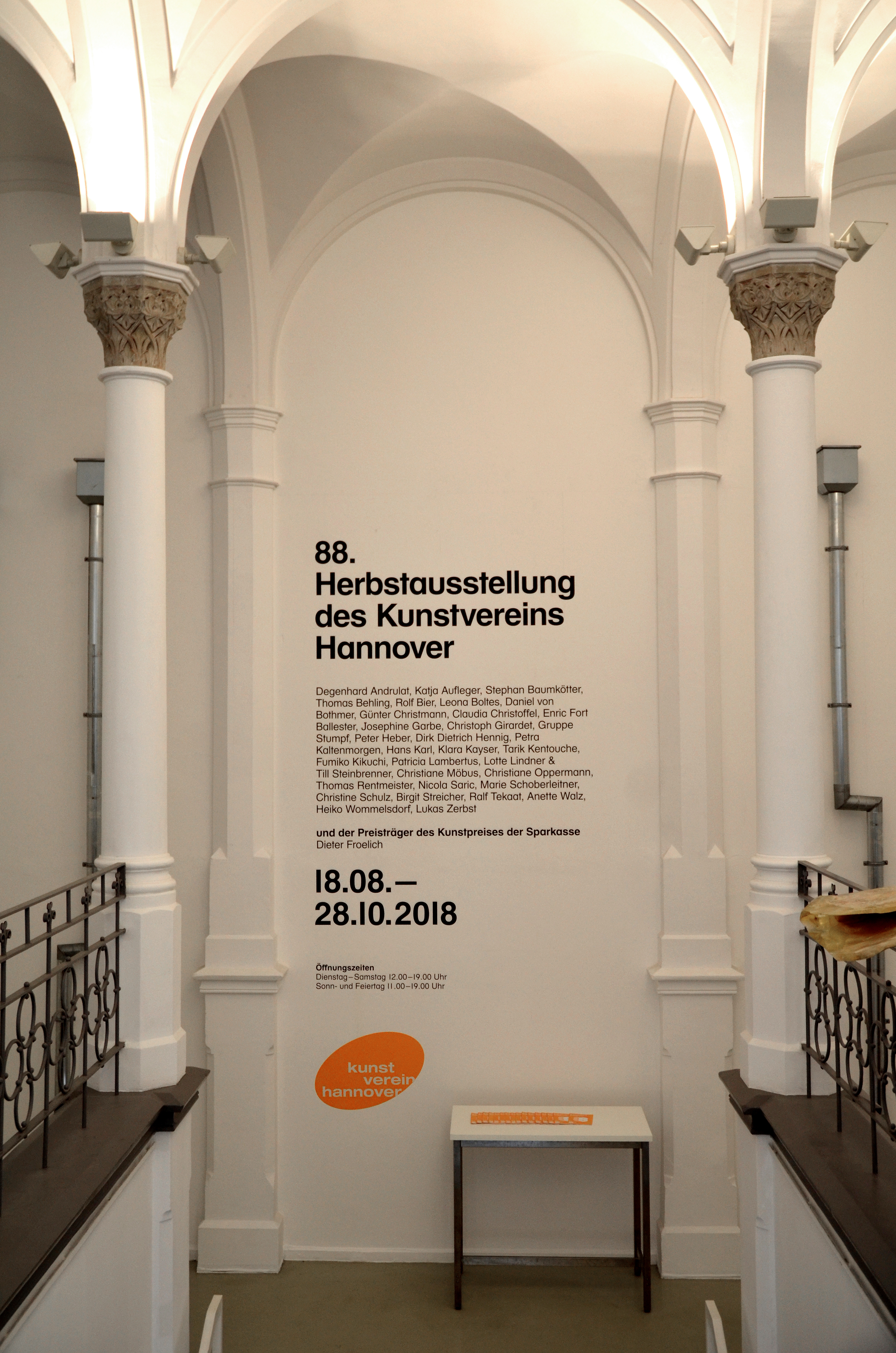 Zur Eröffnung der 88. Herbstausstellung niedersächsischer Künstlerinnen und Künstler im Künstlerhaus Hannover wurde am 27. August 2018 auch der mit 10.000 Euro dotierte Kunstpreis der Sparkasse Hannover vergeben. Preisträger 2018 war der Künstler Dieter Froelich ...